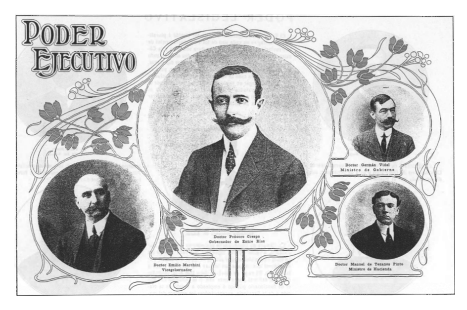 Gabinete Gubernamental del Gobernador de la Provincia de Entre Ríos, Prócoro Crespo (1910-1914).